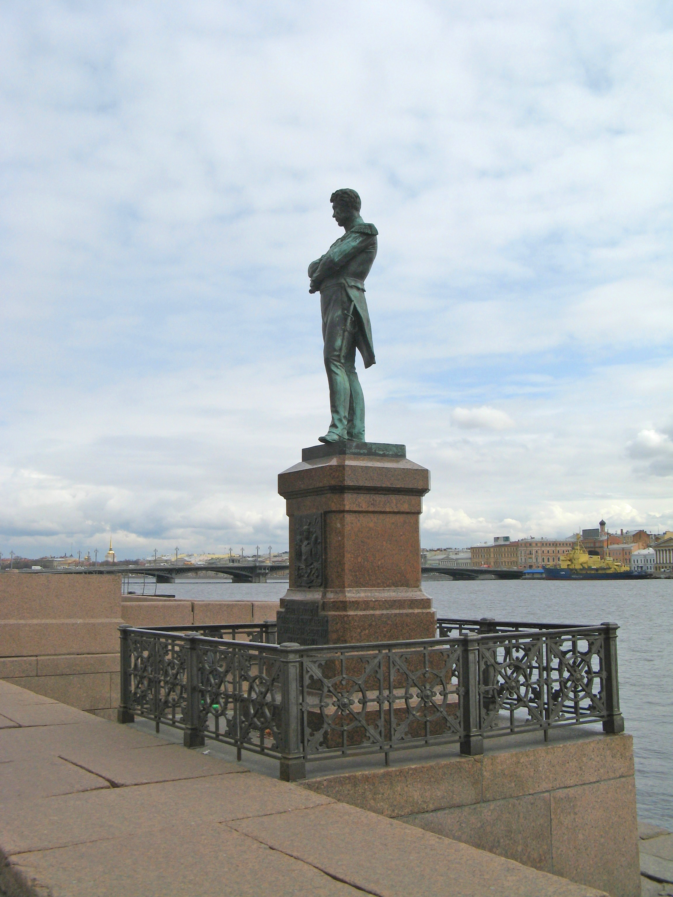 Памятник мореплавателю Крузенштерну И.Ф.: Набережная Лейтенанта Шмидта, у дома 17, Василеостровский район, Санкт-Петербург